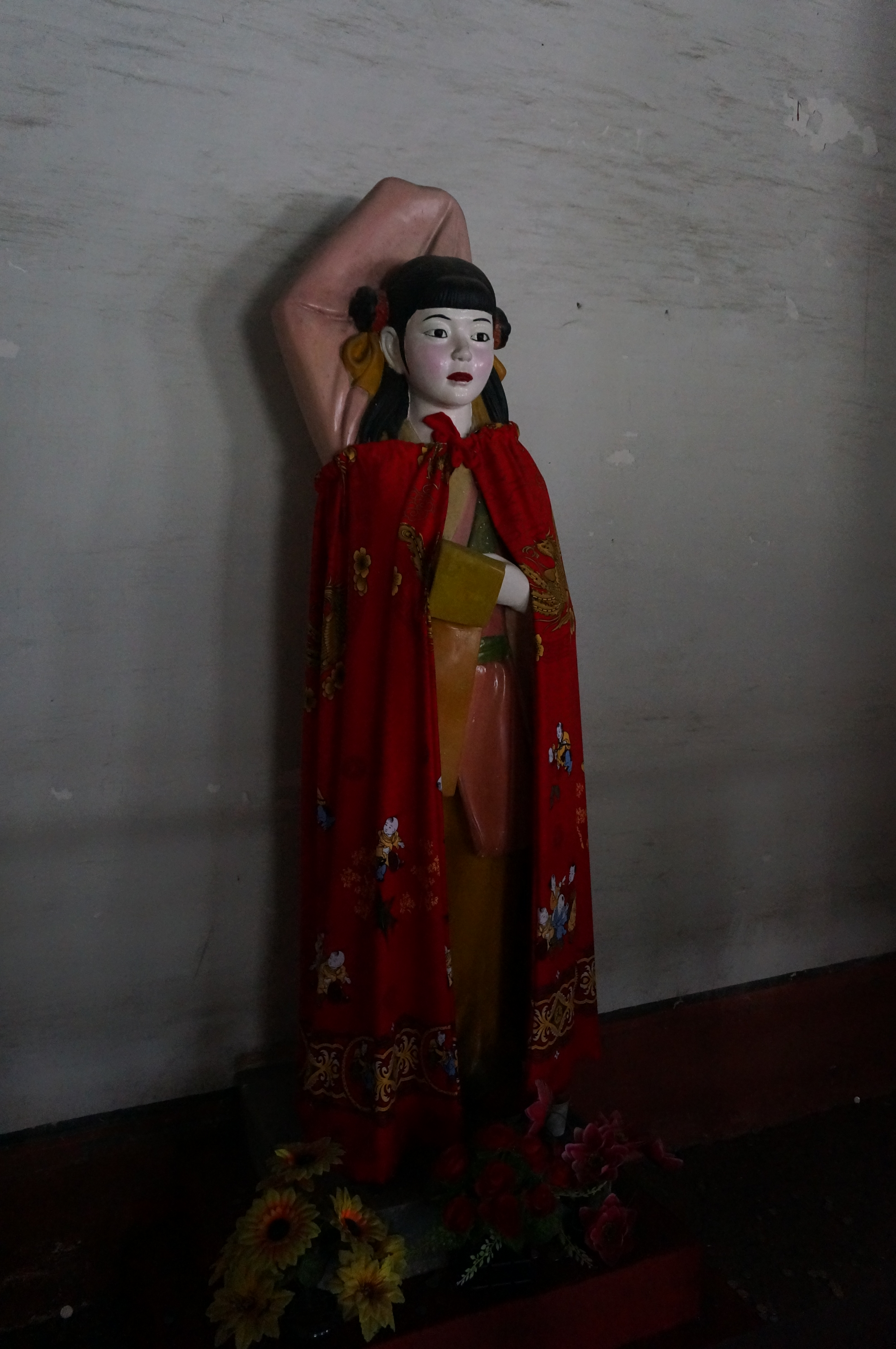 曹娥庙，后殿内诸娥像。